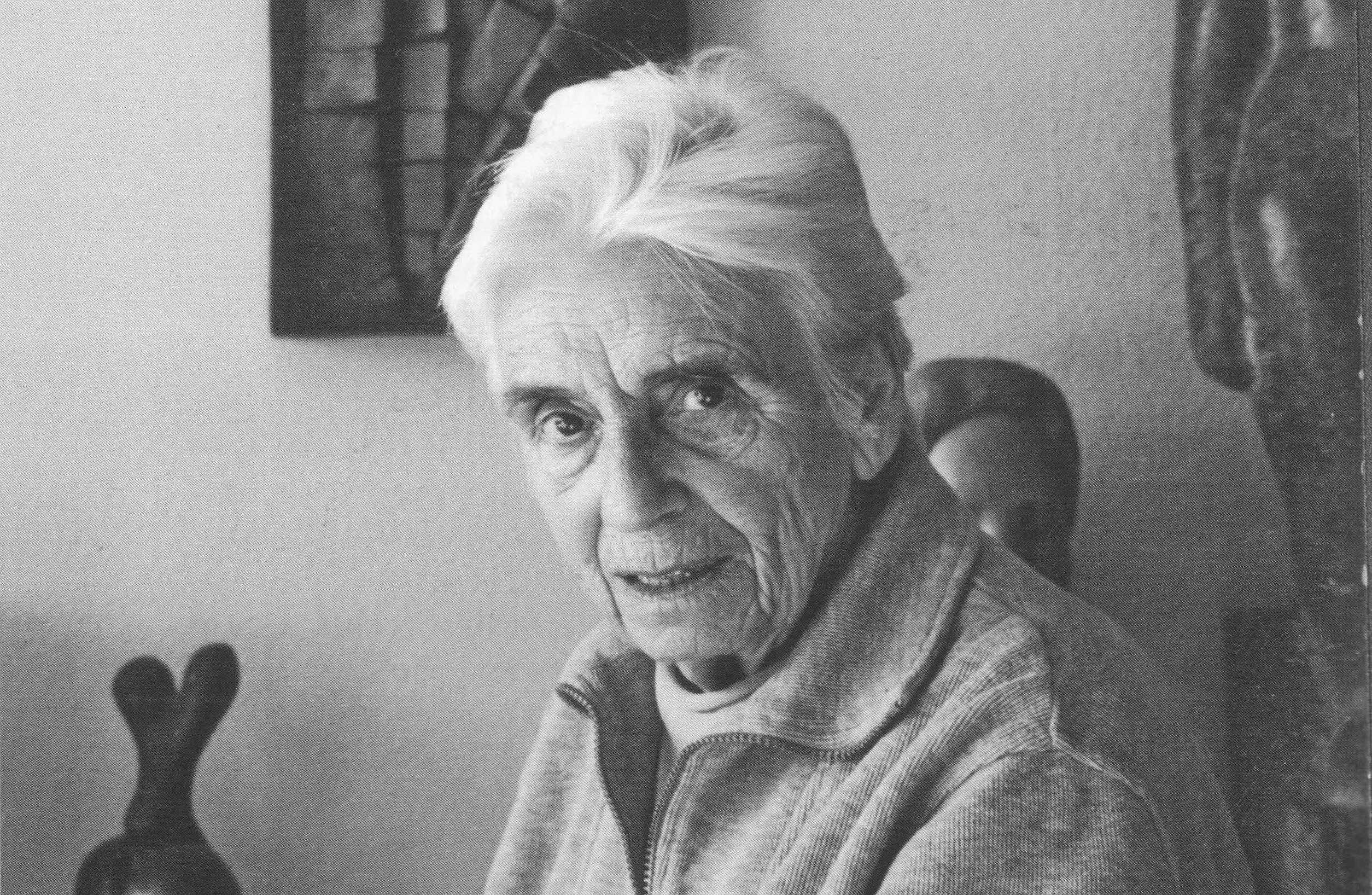 Porträtfoto von Eva Zippel, 2003. Foto: Angelika Fellmer.